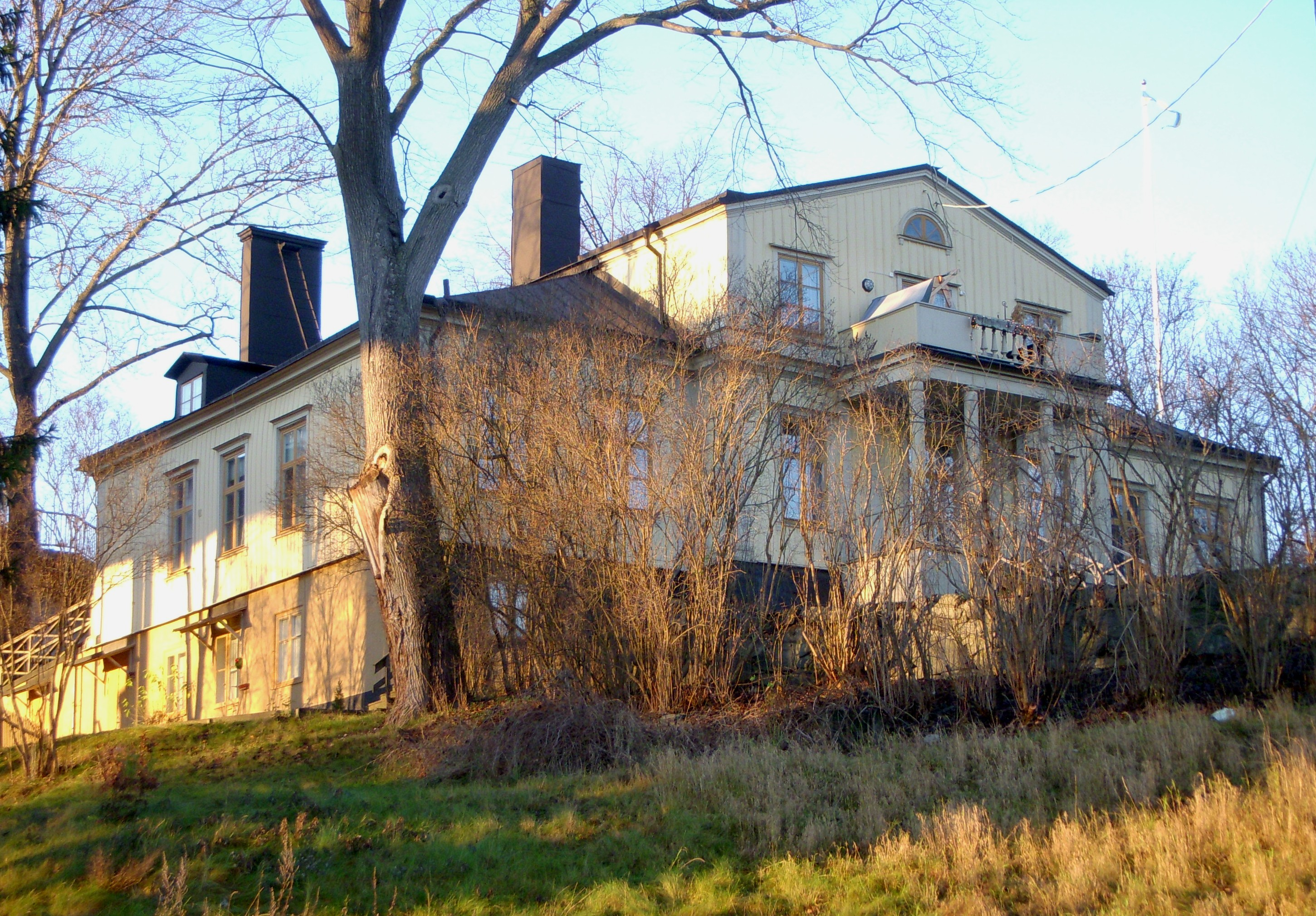 Rålambshovs malmgård, Stockholm